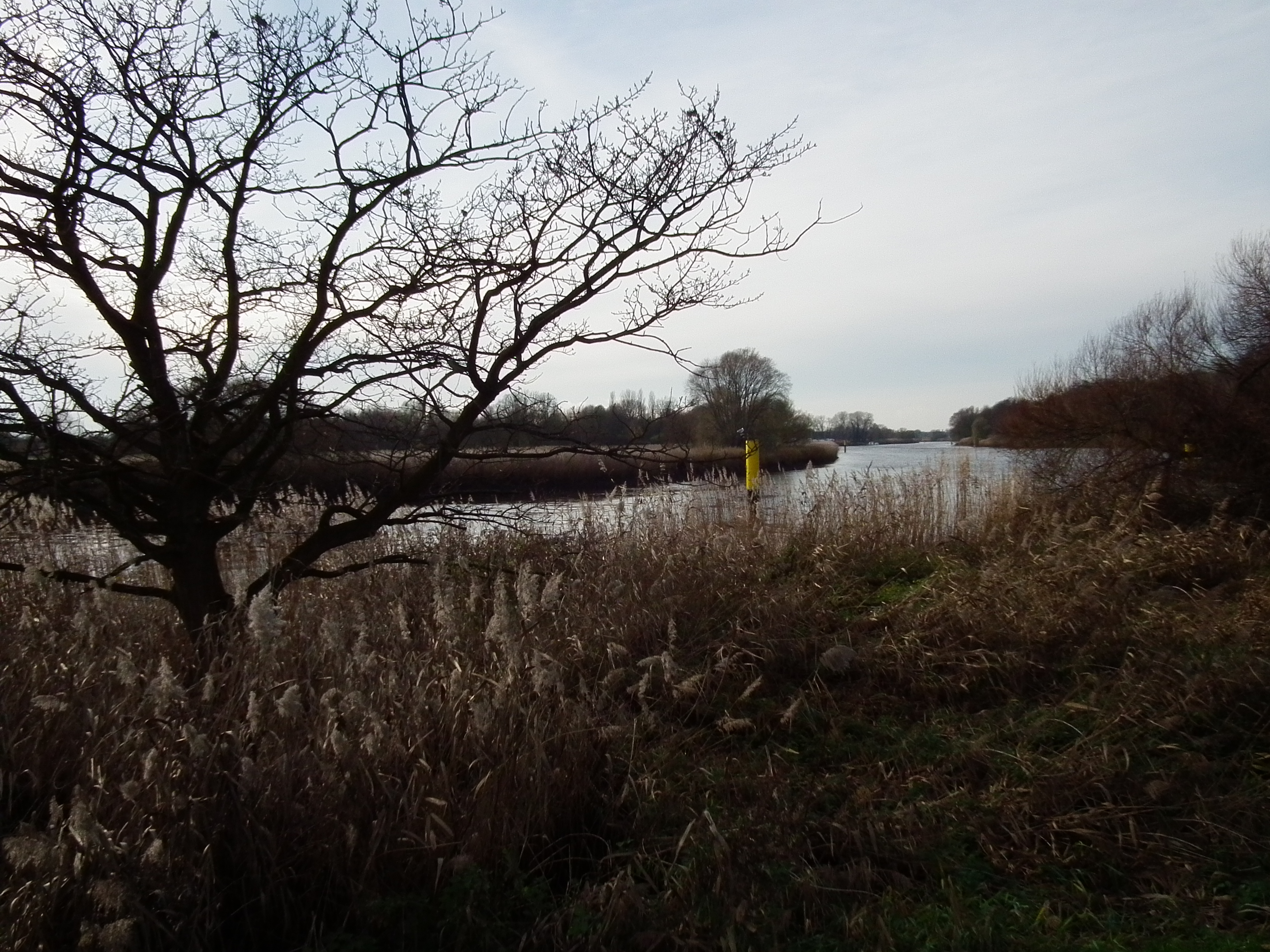 Blick auf die Lesum bei Bremen (Deutschland)